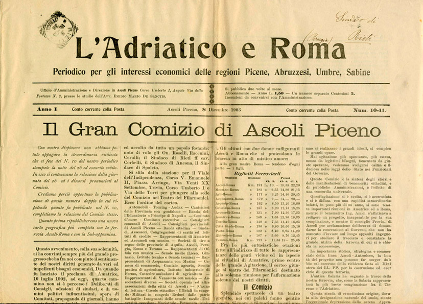 Articolo intitolato "Il gran Comizio di Ascoli Piceno" relativo ad un comizio a favore della costruzione della Ferrovia Salaria, sul giornale "L'Adriatico e Roma" dell'8 dicembre 1903. Giornale conservato presso l'Archivio di Stato di Rieti, classificazione ASCRi. Cat.VII, Rieti-Corese 1922.